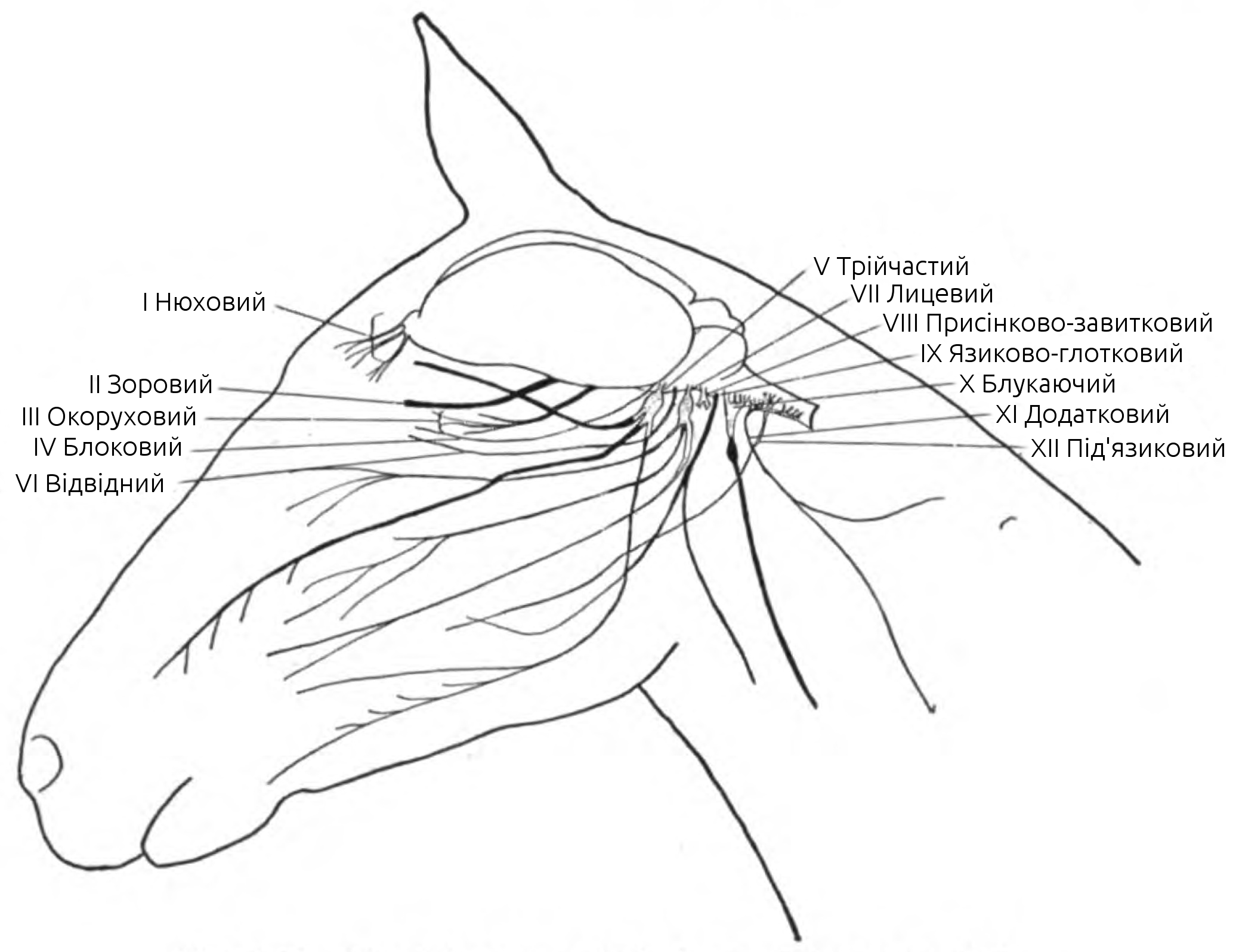 Схема черепних нервів коня